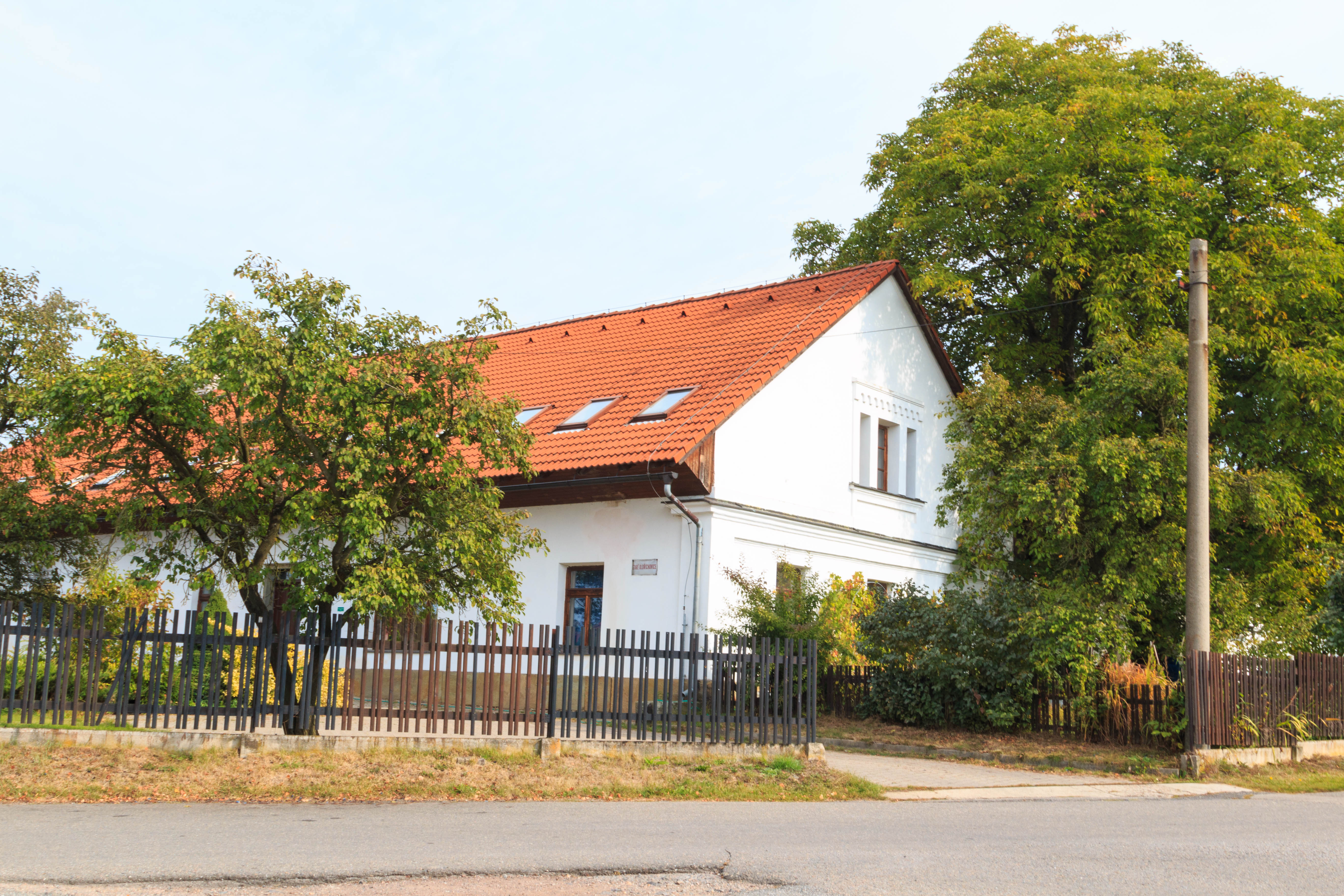 Staré Oldřichovice - čp. 1